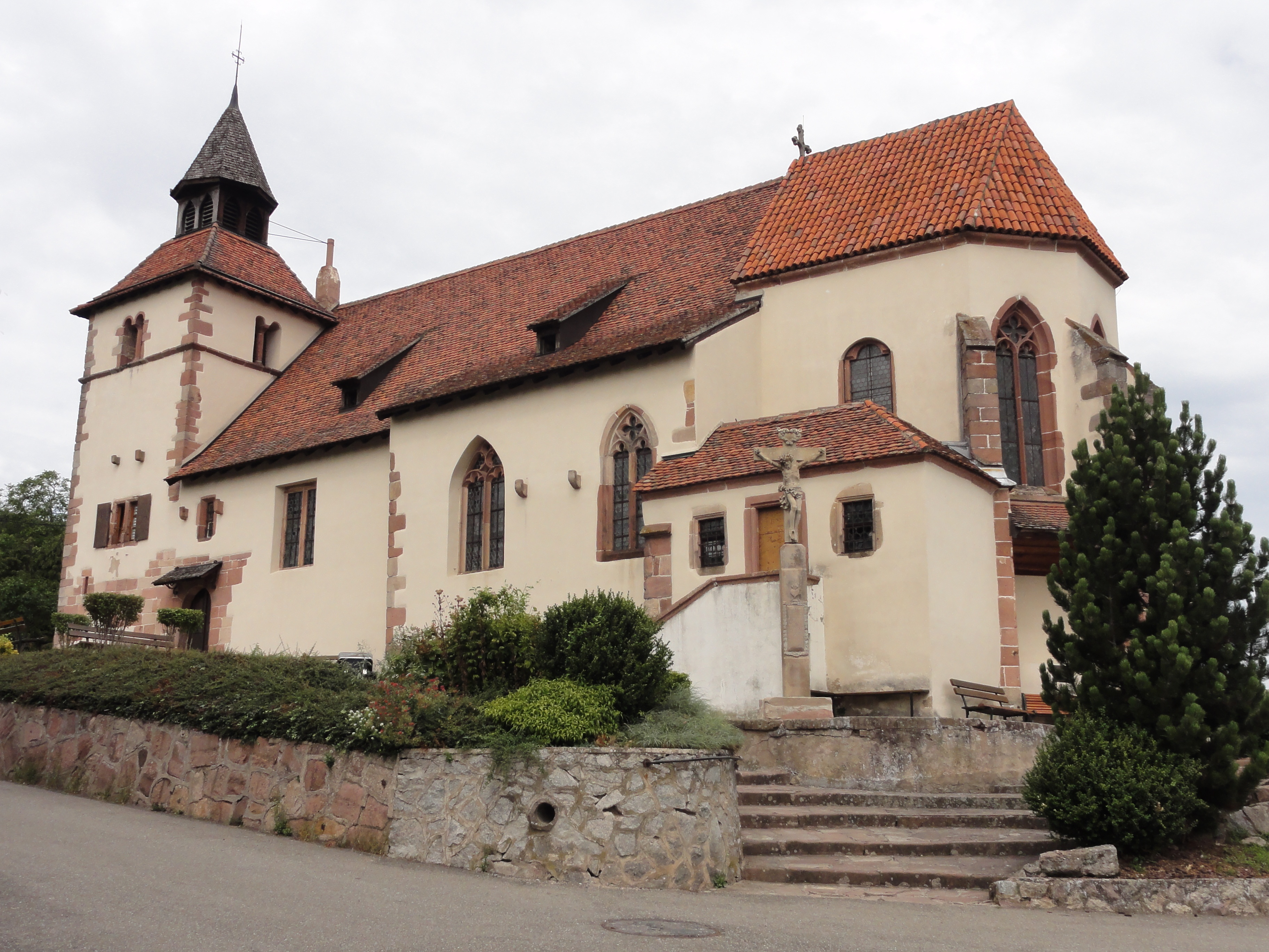 Alsace, Bas-Rhin, Chapelle Saint-Sébastien de Dambach-la-Ville (PA00084677, IA00115228).